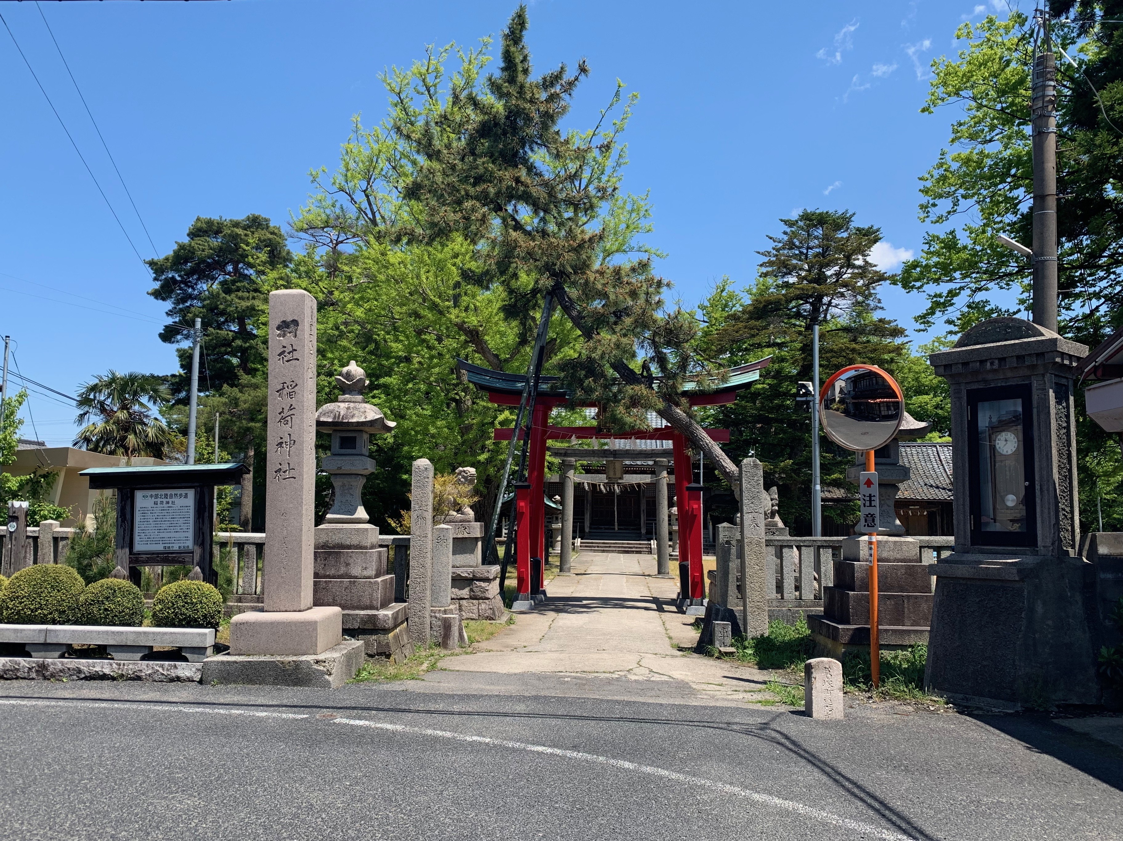 葛塚稲荷神社と葛塚町道路元標（2019年5月）